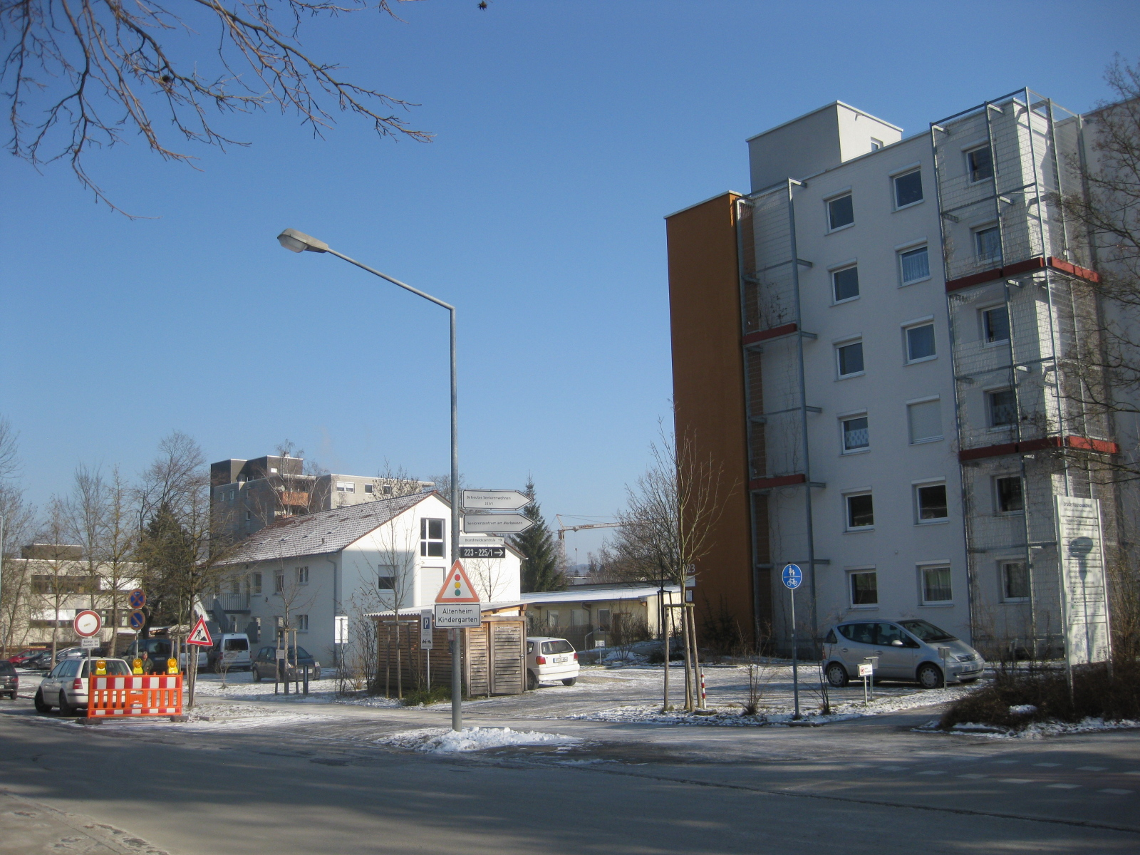 Ringelbachstraße 221 in Reutlingen: Früheres Anwesen der Evangelischen Fachhochschule für Sozialwesen